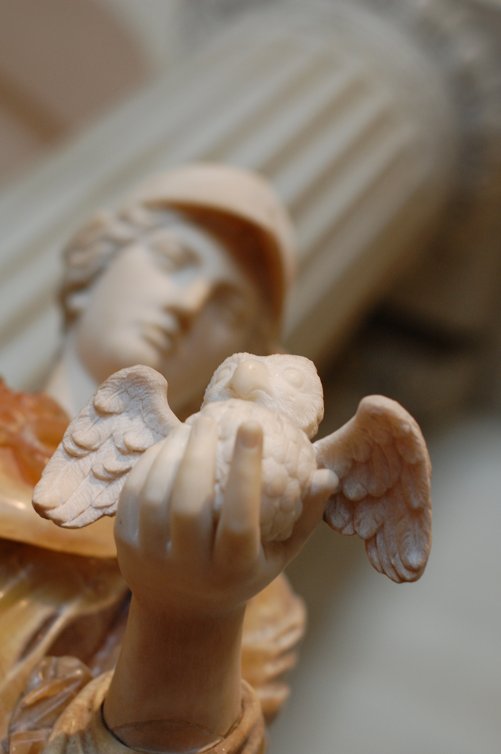 Museé du Louvre: Onyx doré et marbre. II° siècle après J.C. et restaurations en marbre blanc du XVIII° siecle.